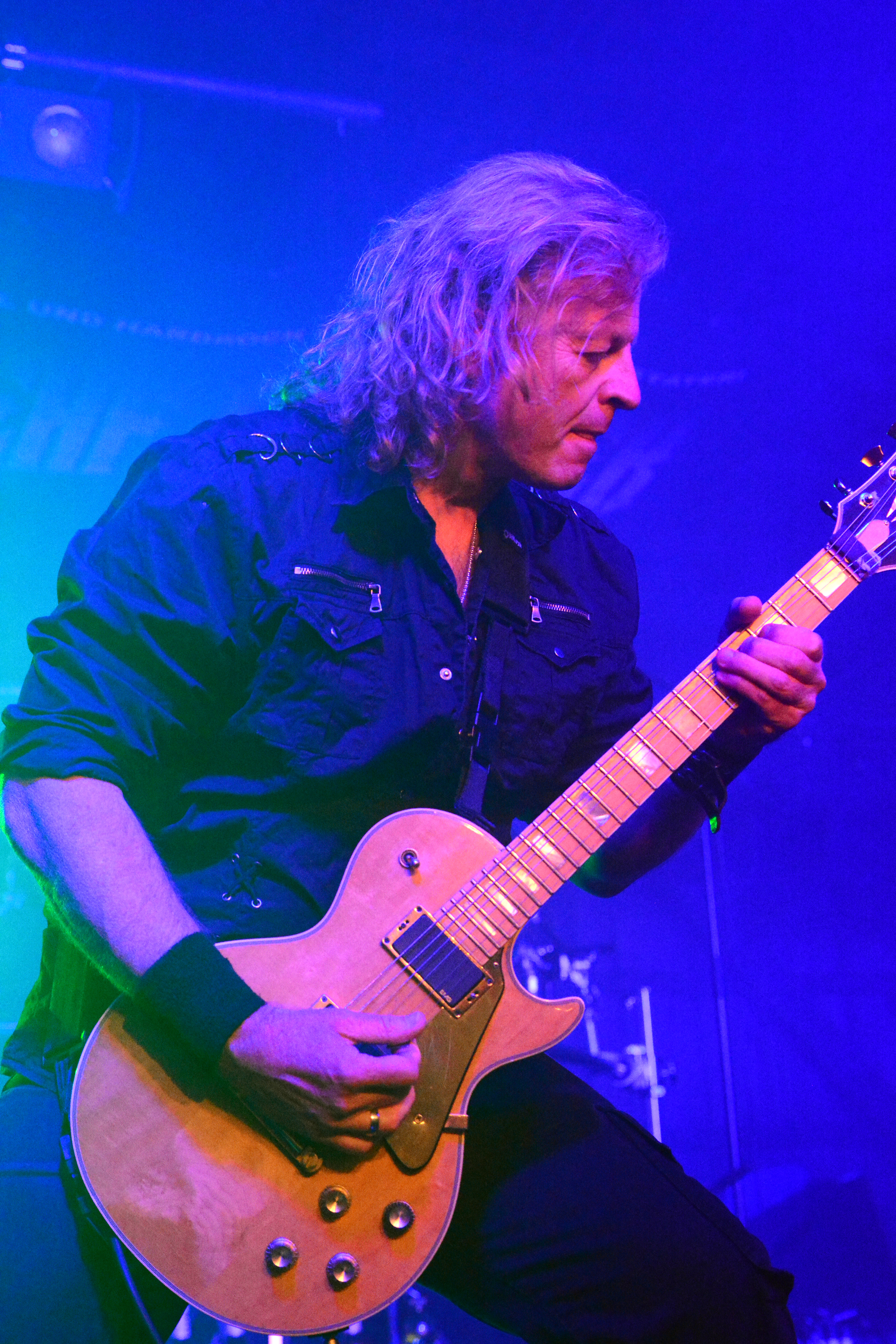 Masterplan beim Headbangers Open Air 2015